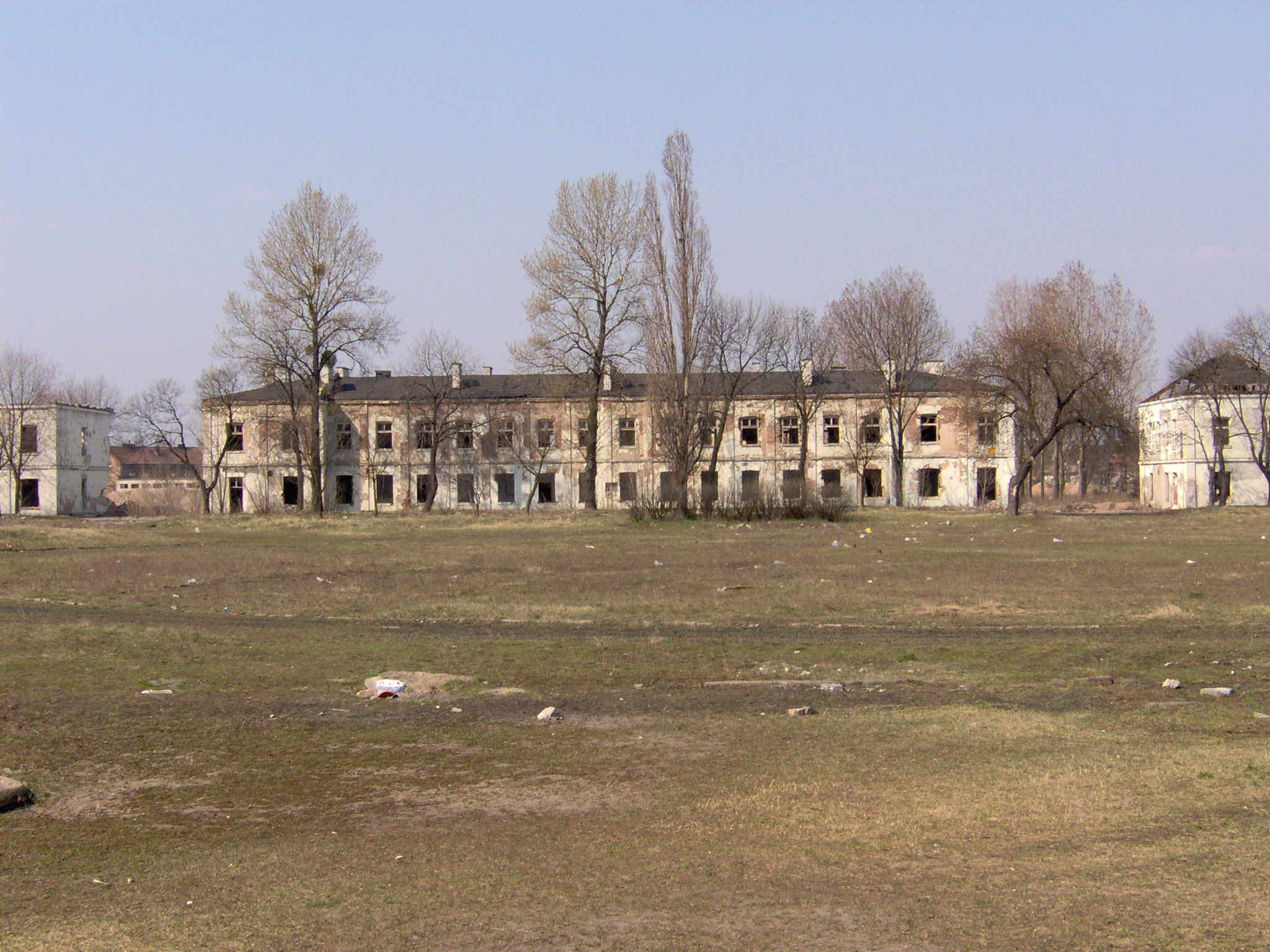 Pozostałości po byłej jednostki wojskowej przy ul. Żytniej 83 (2007 r.)